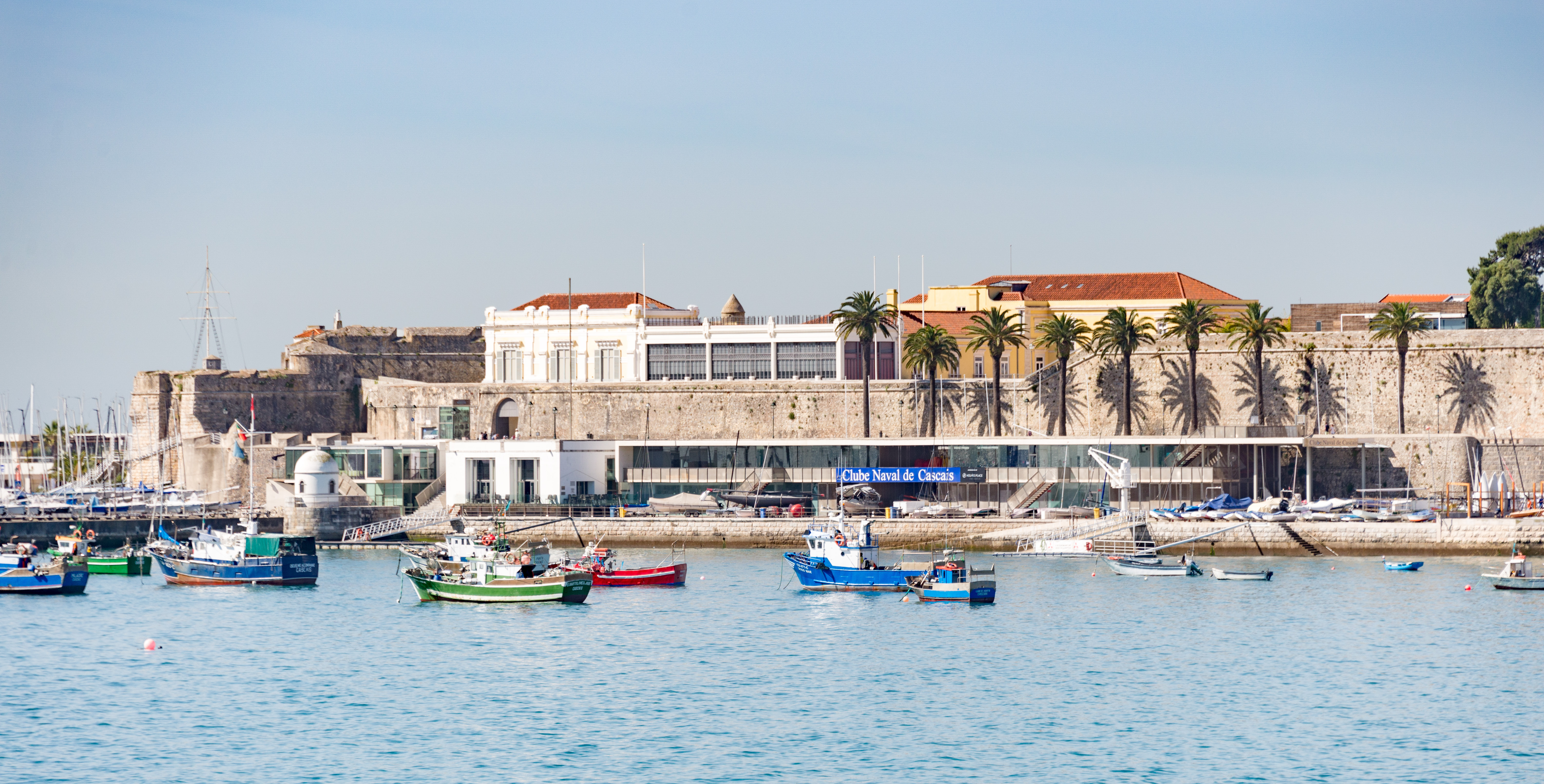 33033-Lisbon